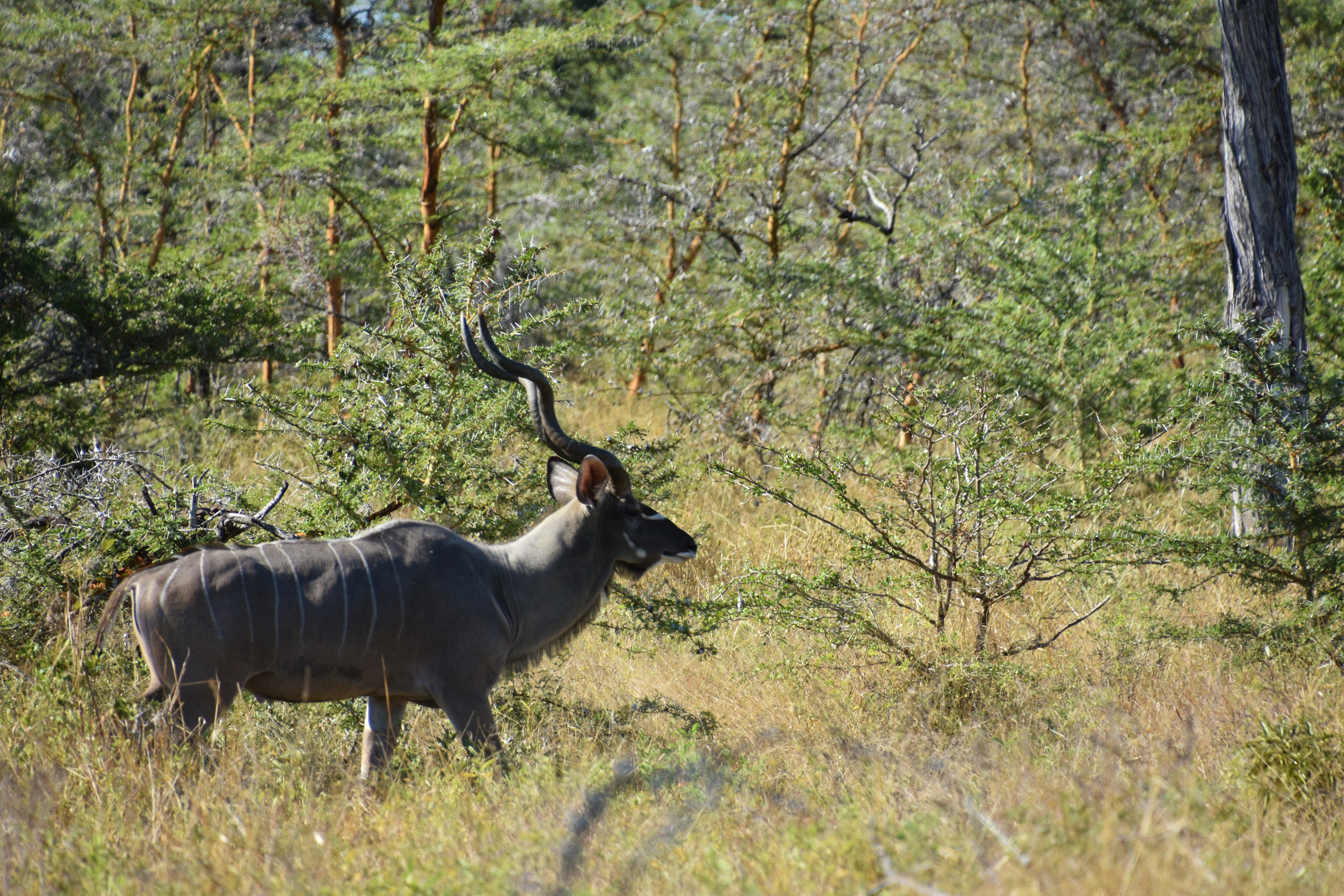 Kudu, Selous Game Reserve (4)